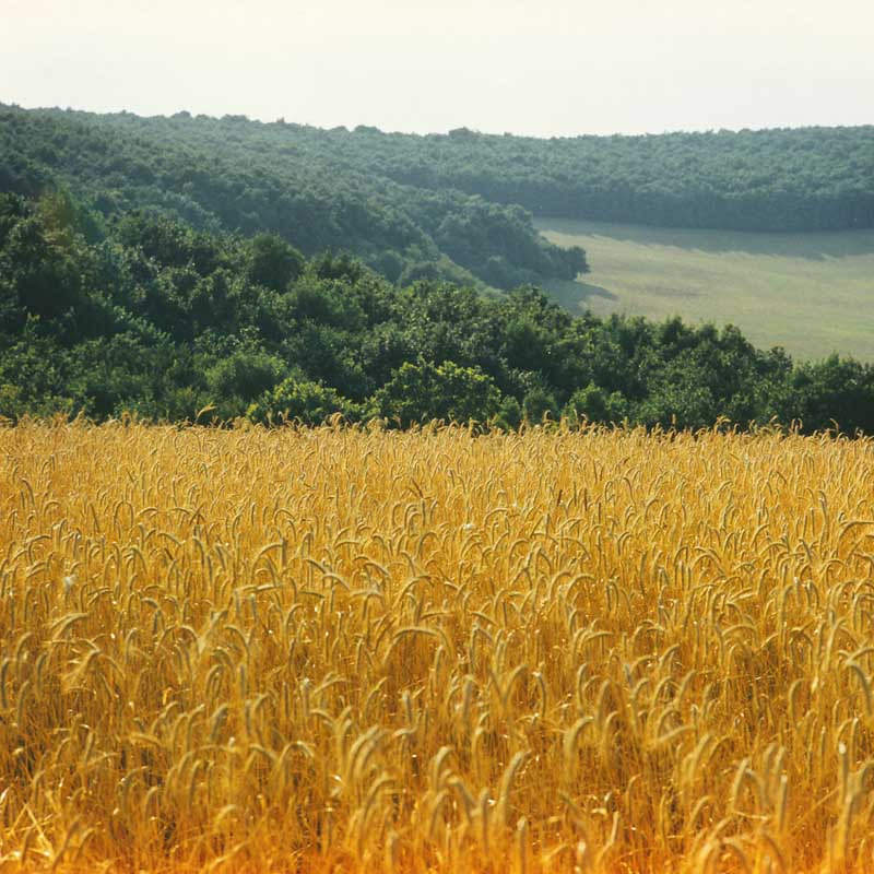 Hîncești district (1980).jpg